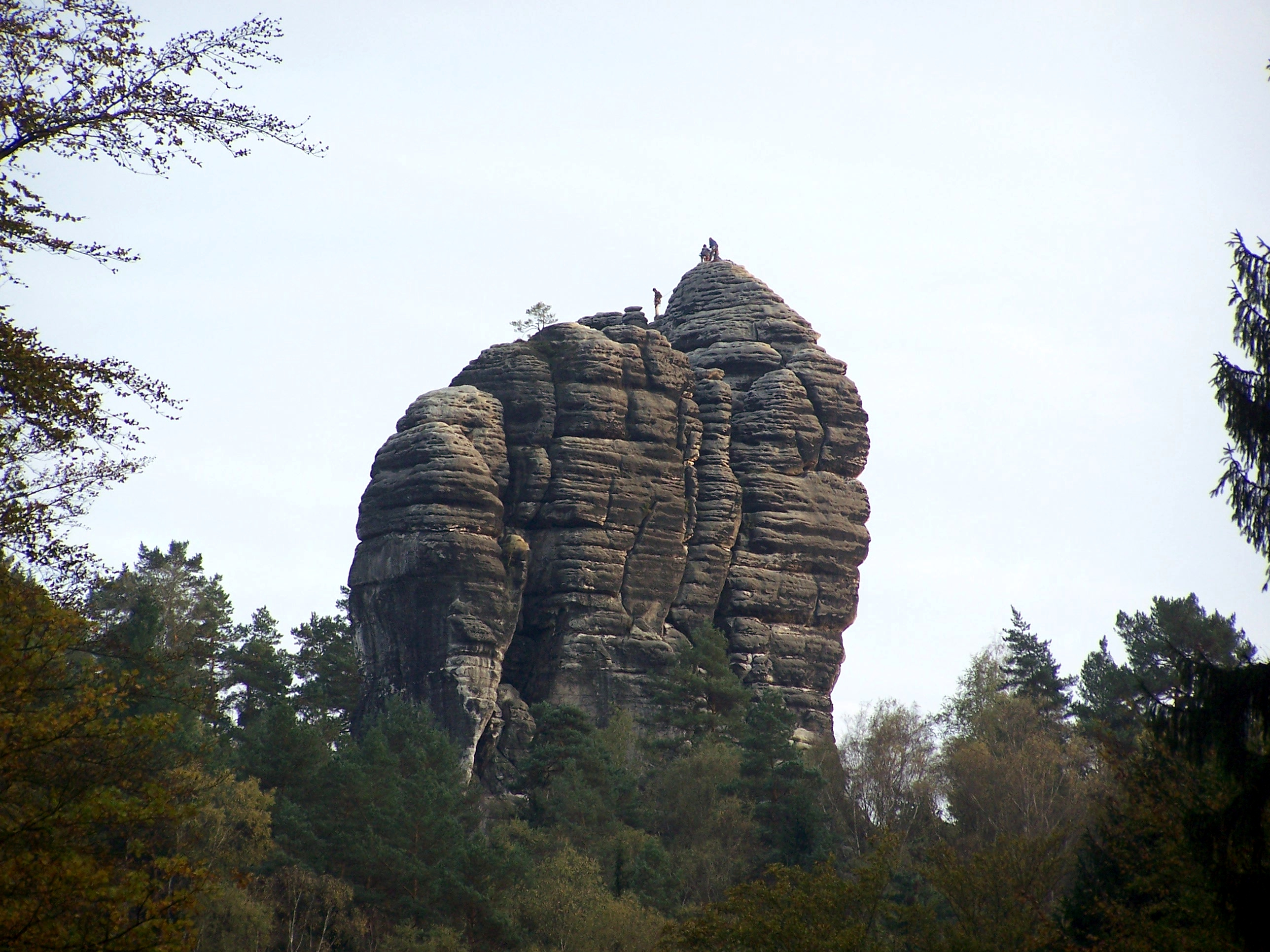 Kletterer auf dem Talwächter in der Sächsischen Schweiz, fotografiert vom Amselsee aus